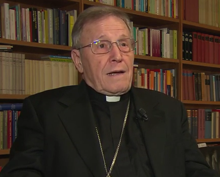 Le cardinal Walter Kasper lors d'une interview en janvier 2016.